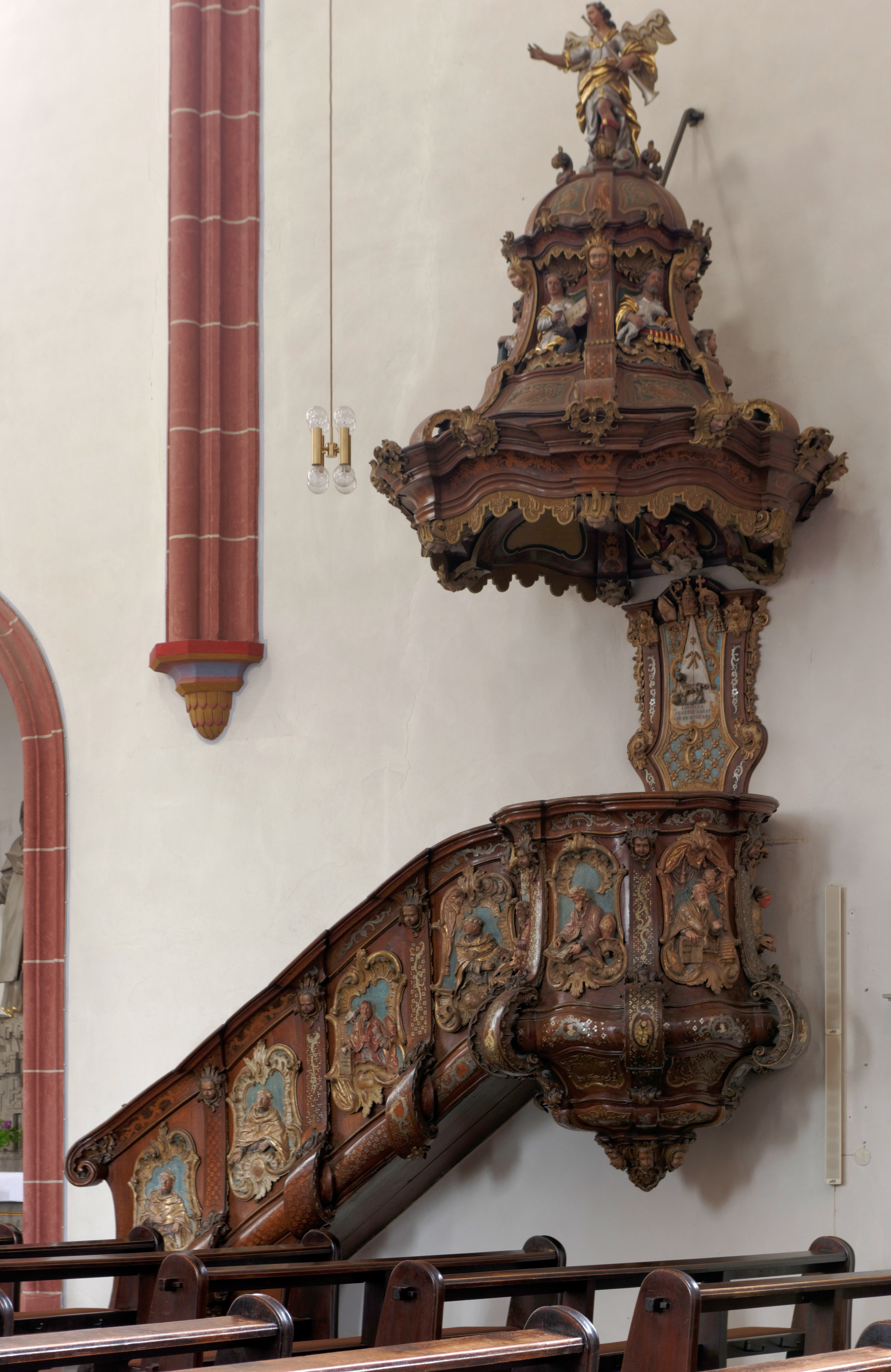 Trier, St. Antonius, Kanzel